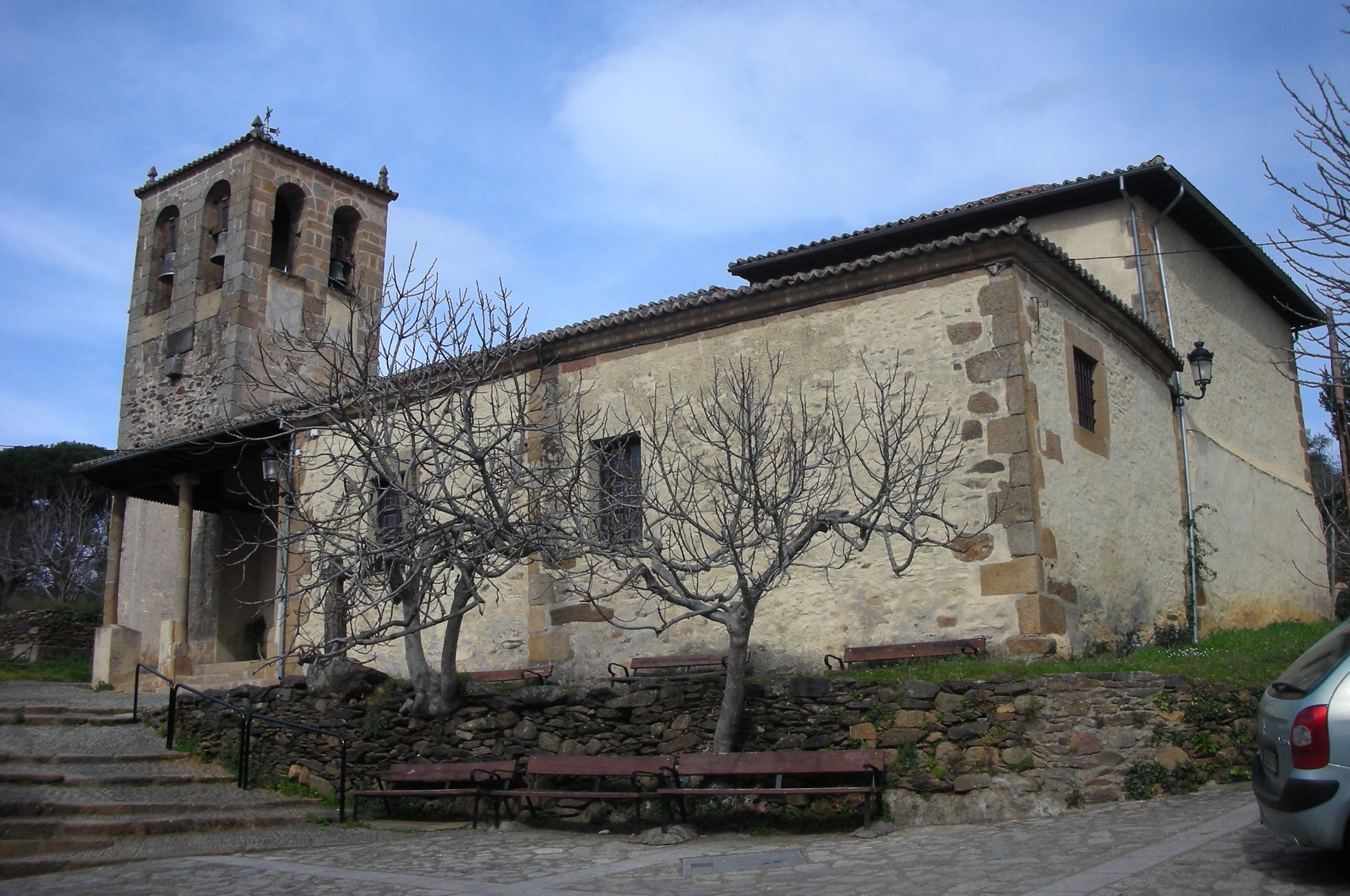 Eglise Nuestra Señora de la Asunción de la Commune de Sotoserrano en Espagne